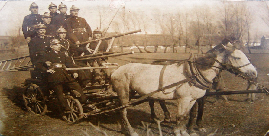 Strażacy na konnej pompie- Pisarowce lata 30 XX wieku.